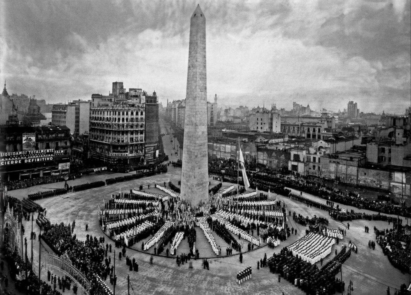 Vista de la Plaza de la República el Día de la Bandera, Buenos Aires, en 1936. Se aprecian la Diagonal Norte y, a la izquierda de la imagen, carteles alusivos a las obras de ensanche de la calle Corrientes, entonces en curso entre Carlos Pellegrini y el Bajo.